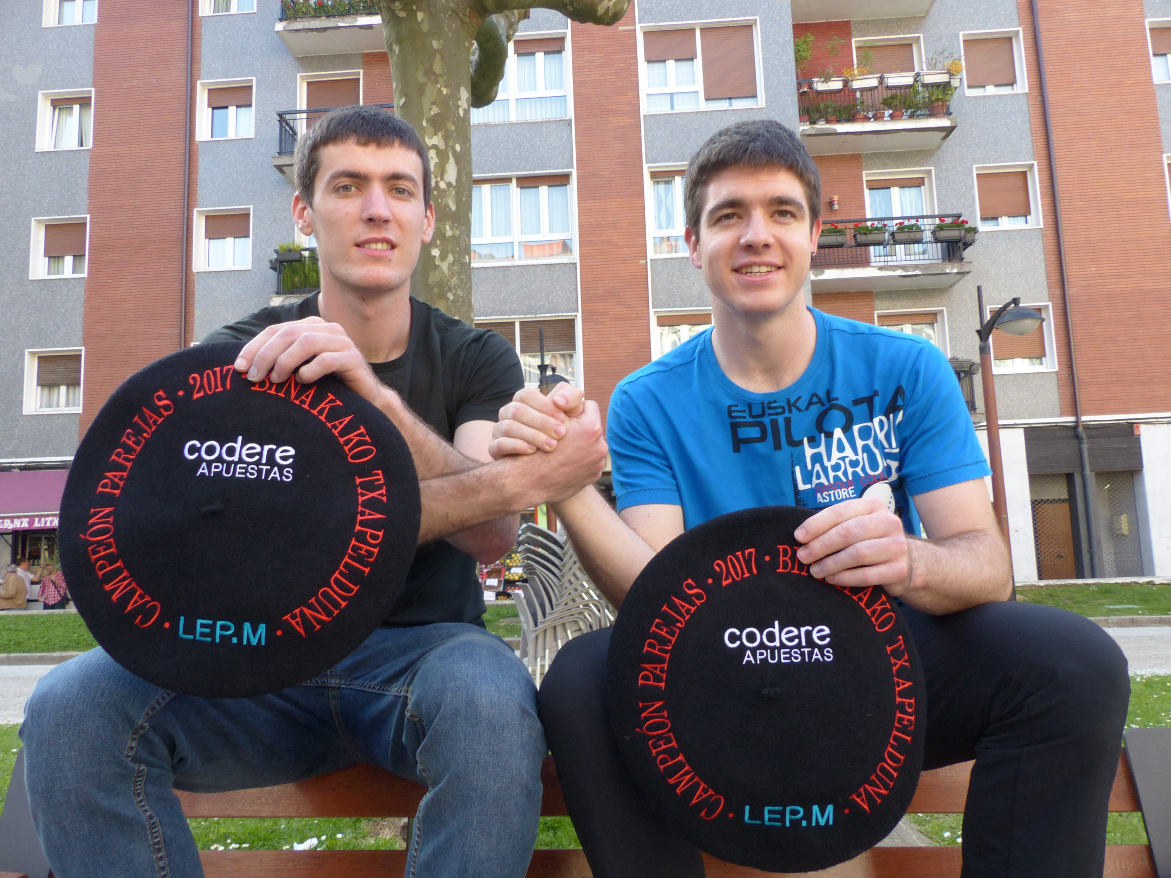 Beñat Rezusta eta Iker Irribarria, binakako txapelarekin, Bergaran (2017-04-10)